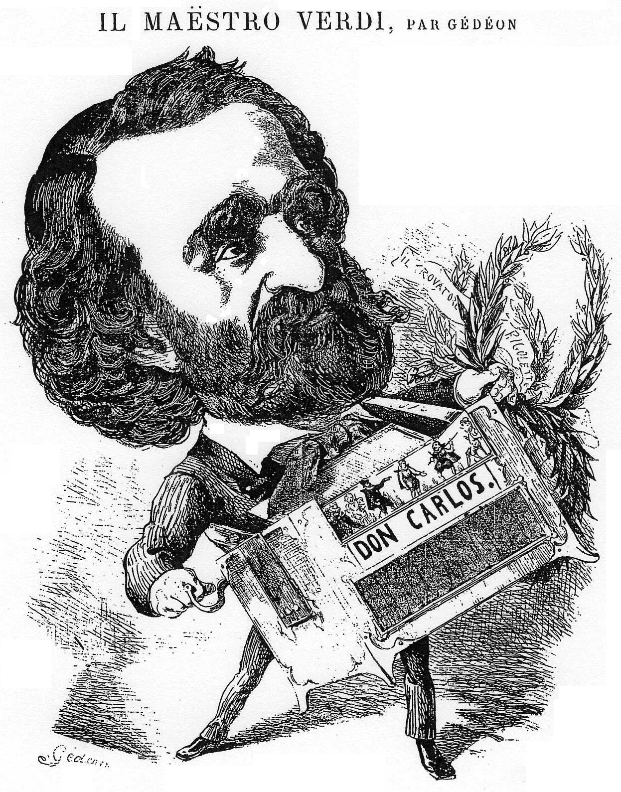 Giuseppe Verdi Don Carlos 1867 par Gédéon